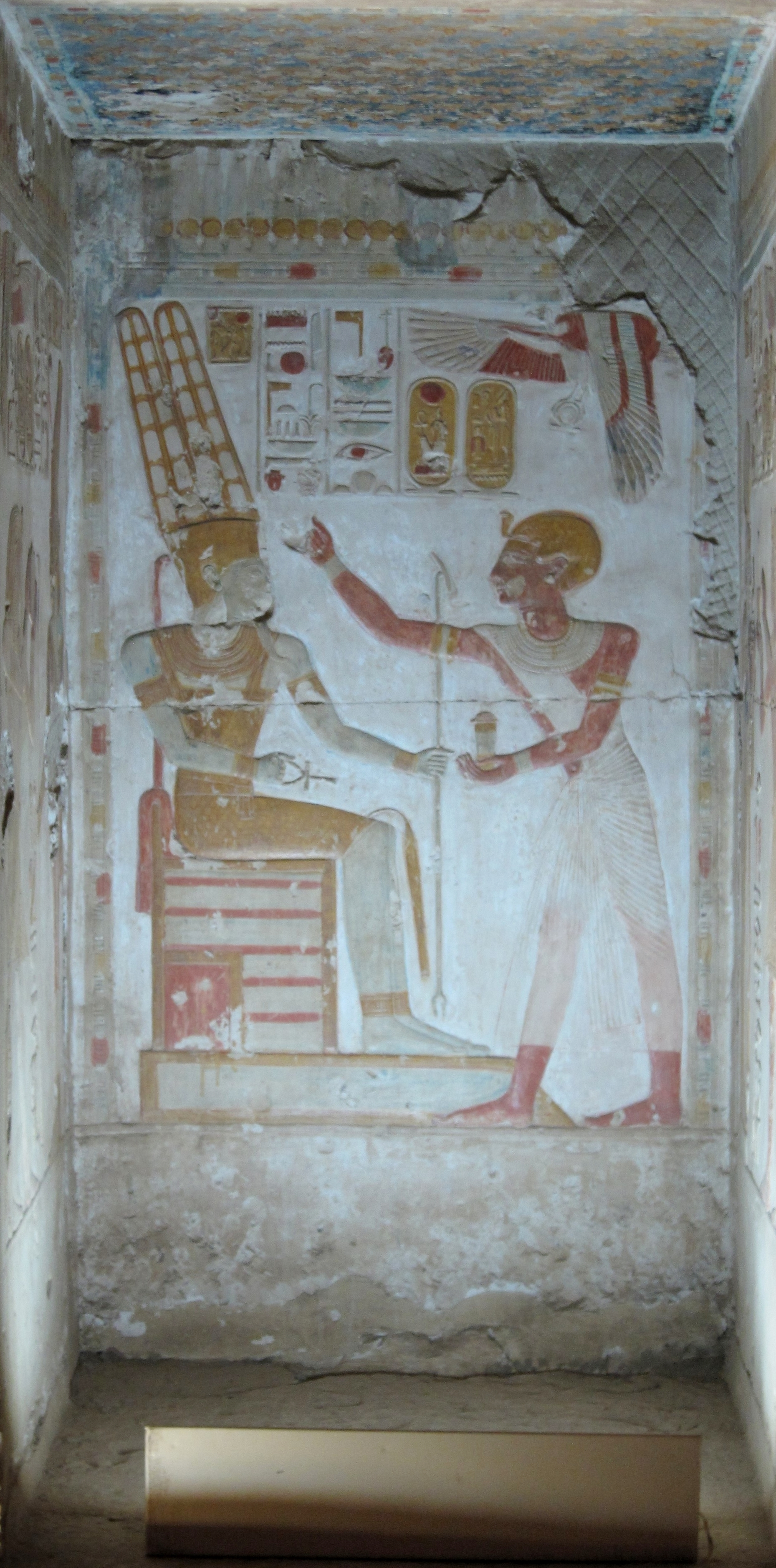 Relief des Königs Sethos I. vor dem Gott Amun-Re im Totentempel Sethos I. in Abydos, Ägypten